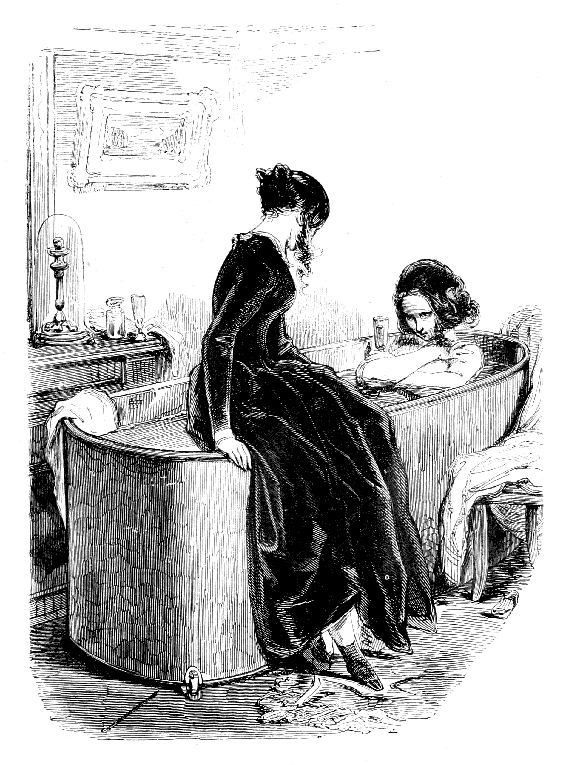 Les Lorettes - 10 - d384 - Ce que c’est pourtant que nos sentiments !…